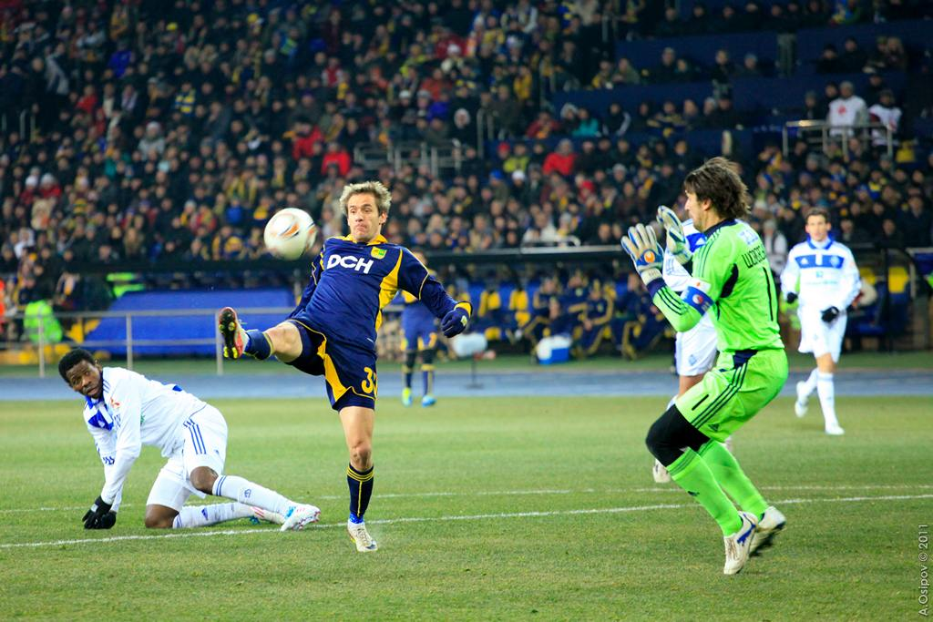 Марко Девич и Александр Шовковский